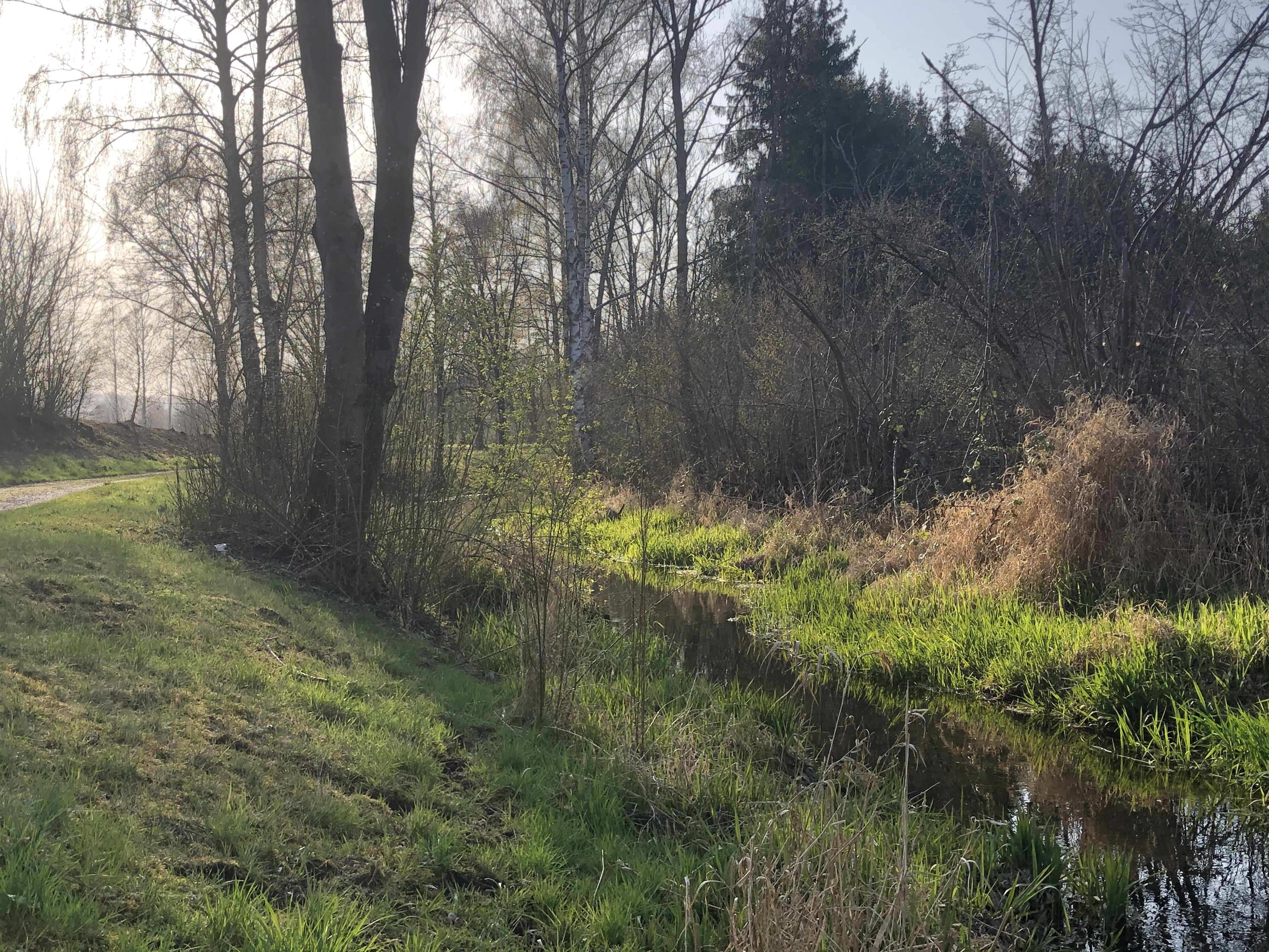 Chriesbach bei Wangen Höhe Autobahnausfahrt